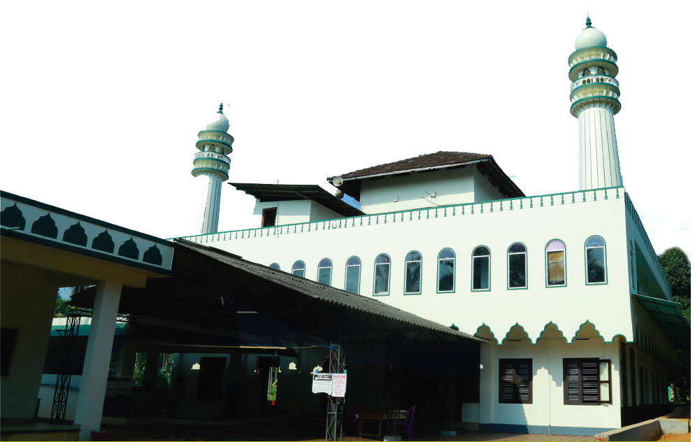 റഹ്മാനിയ മസ്ജിദ് വെള്ളൂർ പാപ്പാട്ടുങ്ങൽ, ചീനിക്കൽ